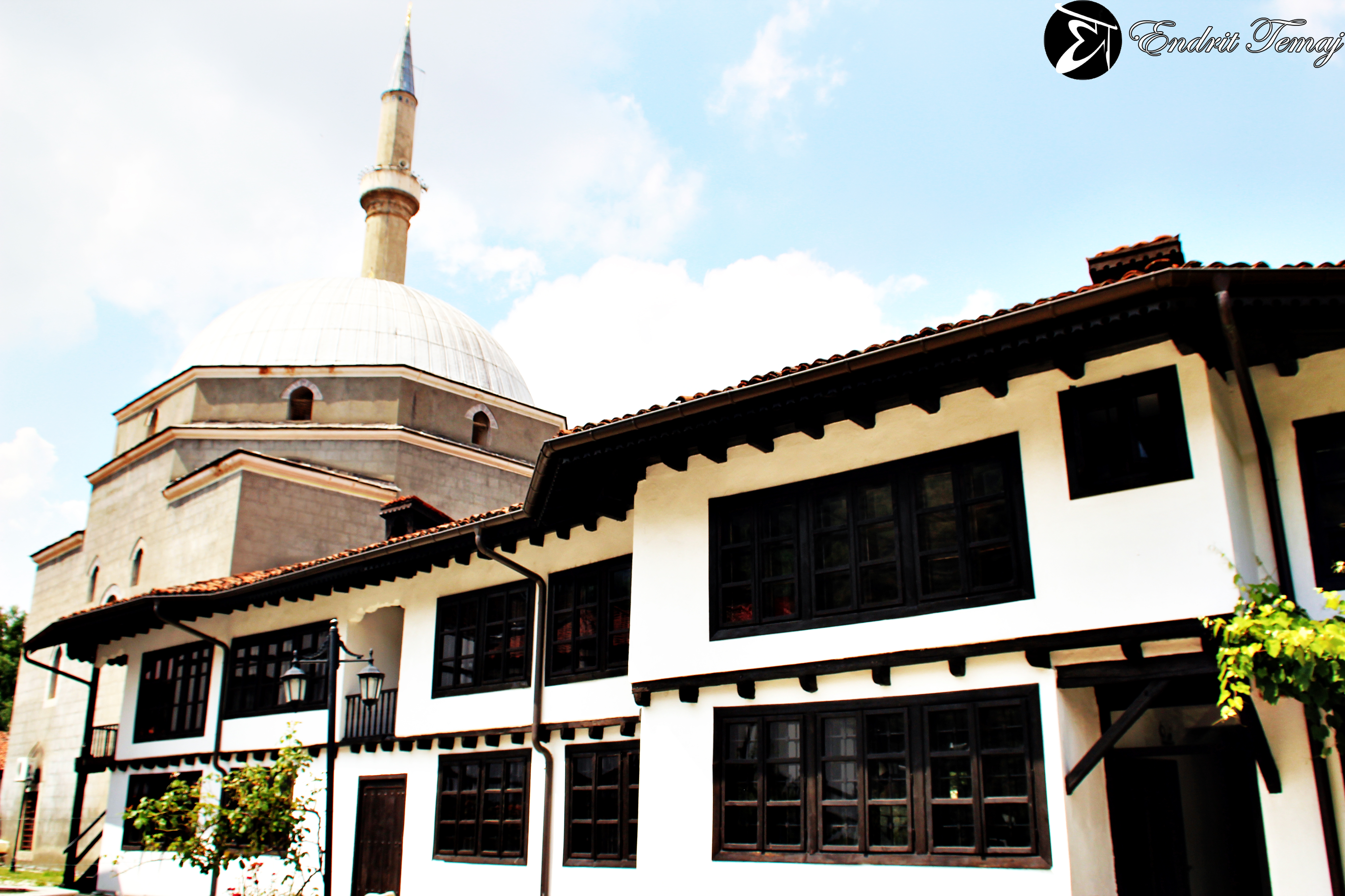 Albania League of Prizren